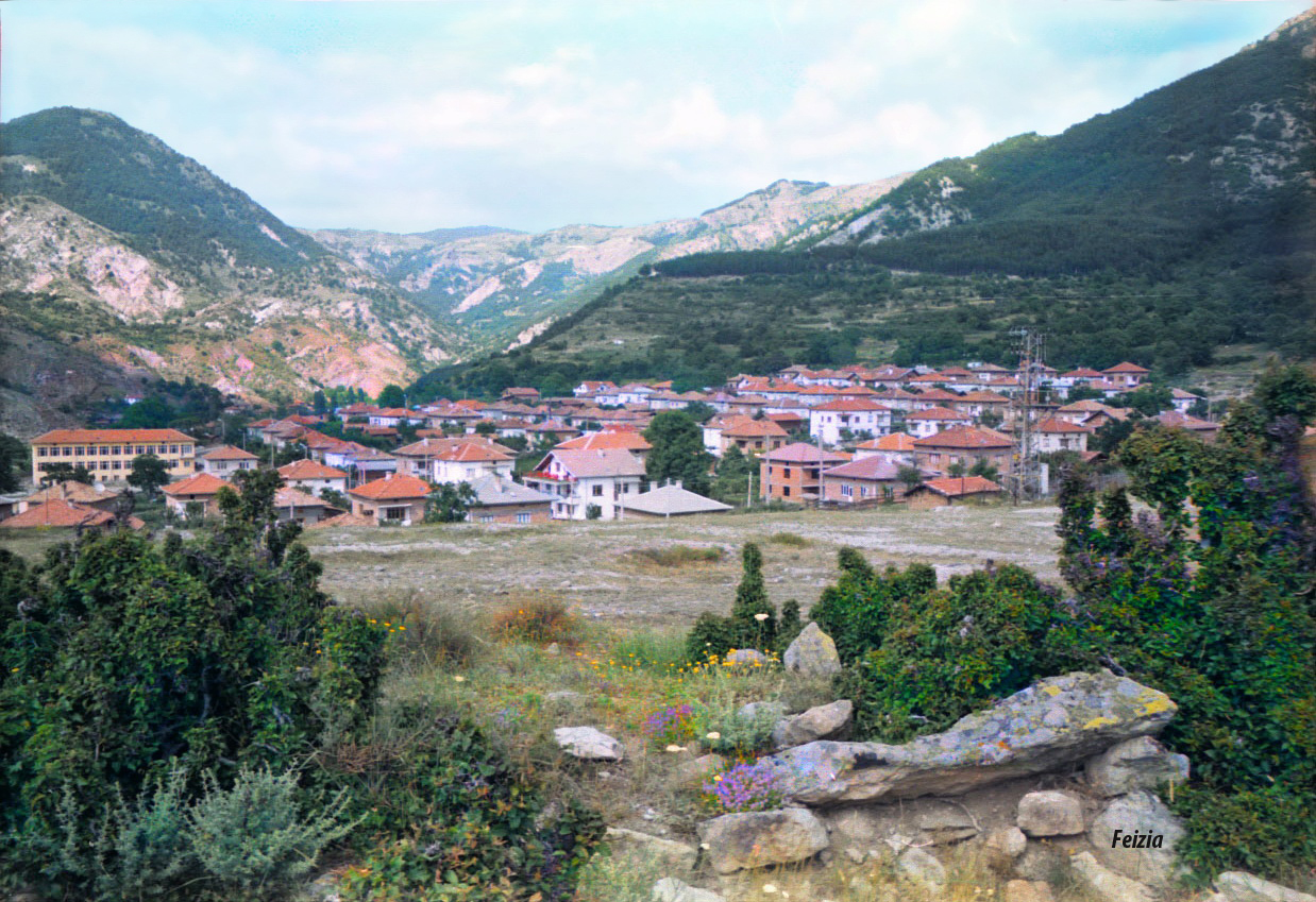 село Буково, община Гоце Делчев